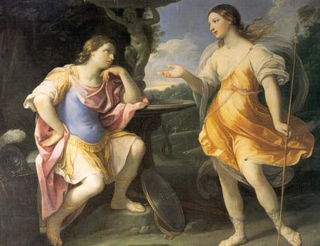 Illustration to Orlando Furioso by Lodovico Ariosto